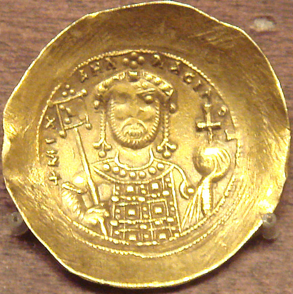 Nomisma of Mikael VII Doukas